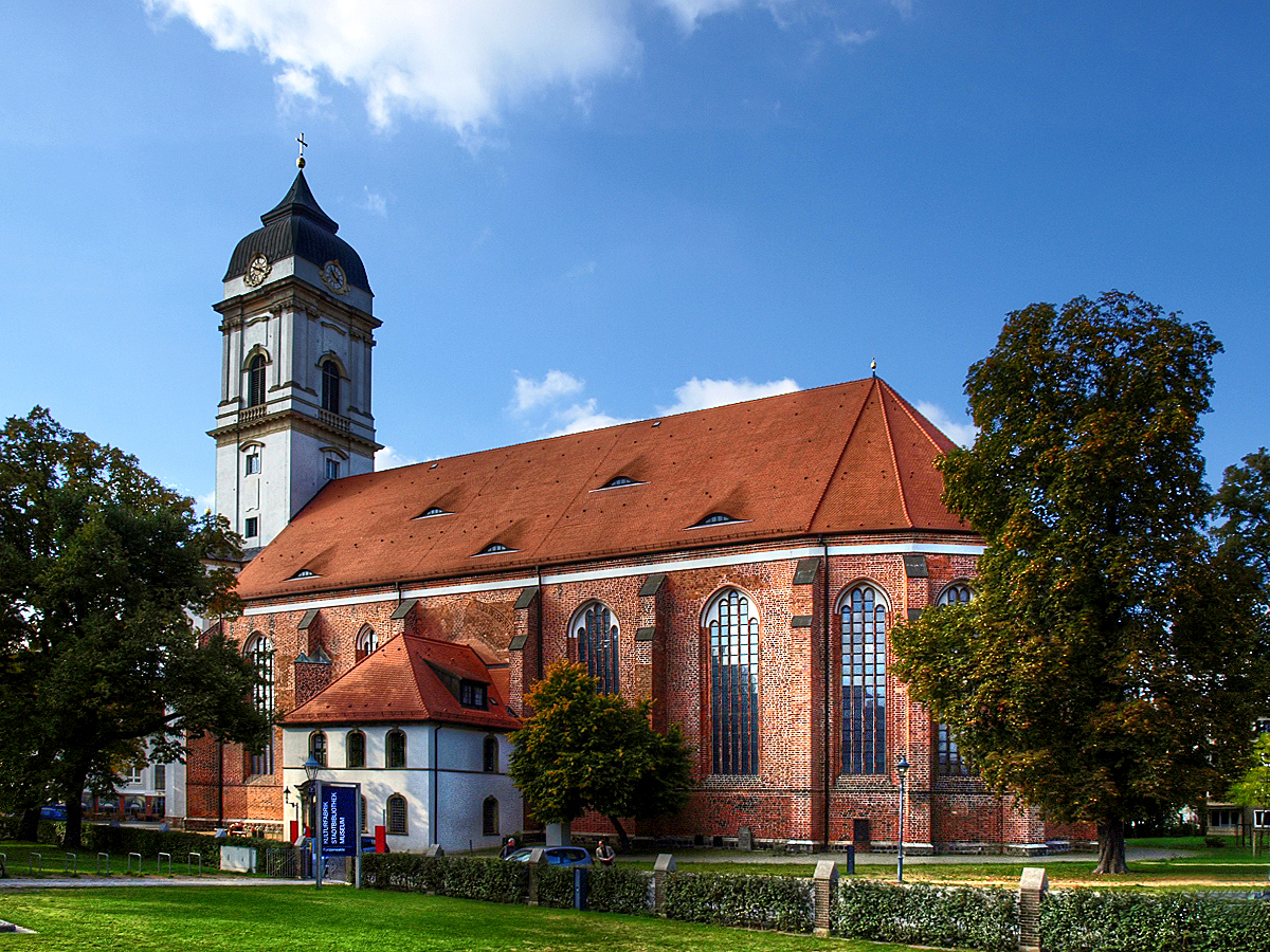 Dom St Marien